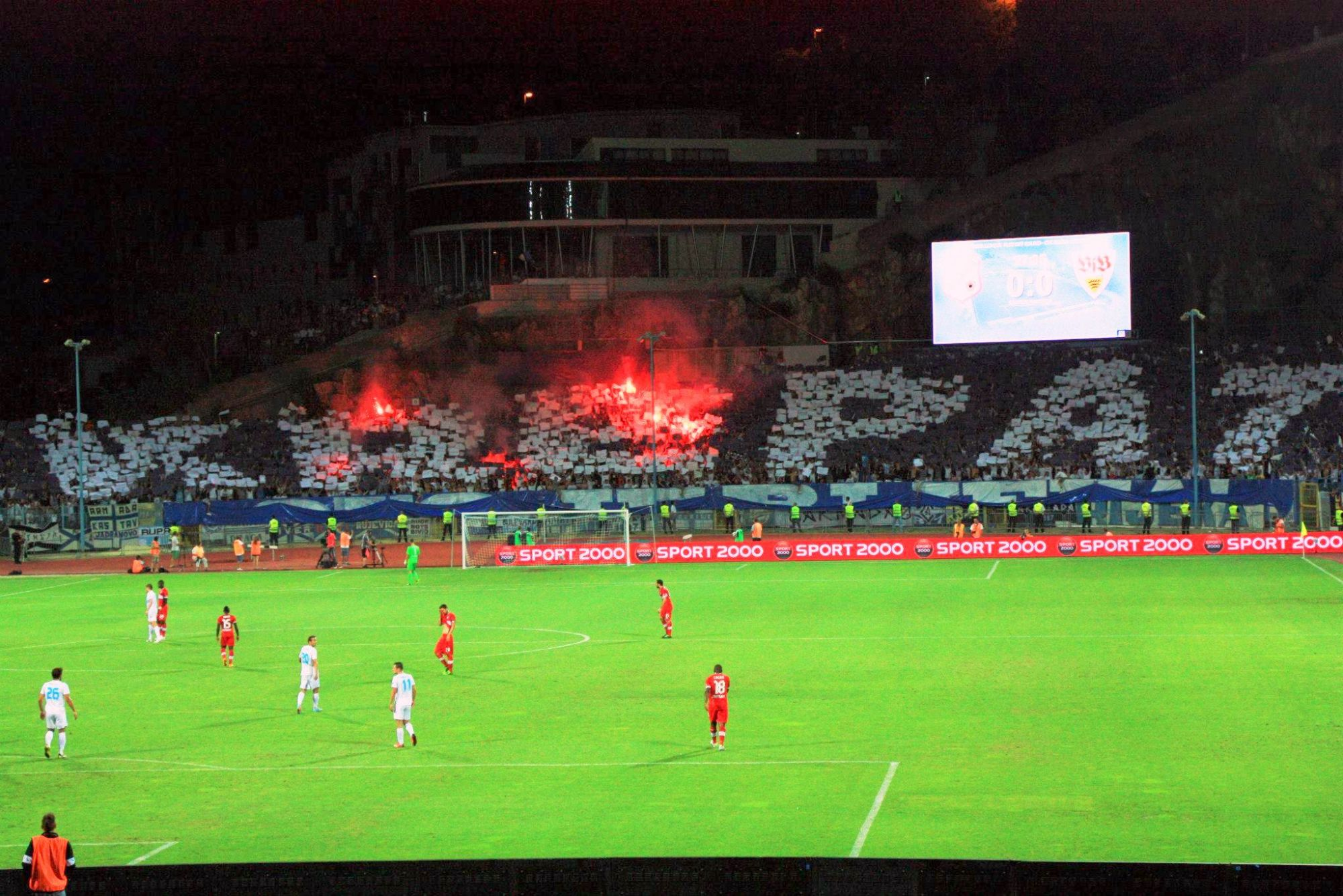 Stadion Kantrida....krepat